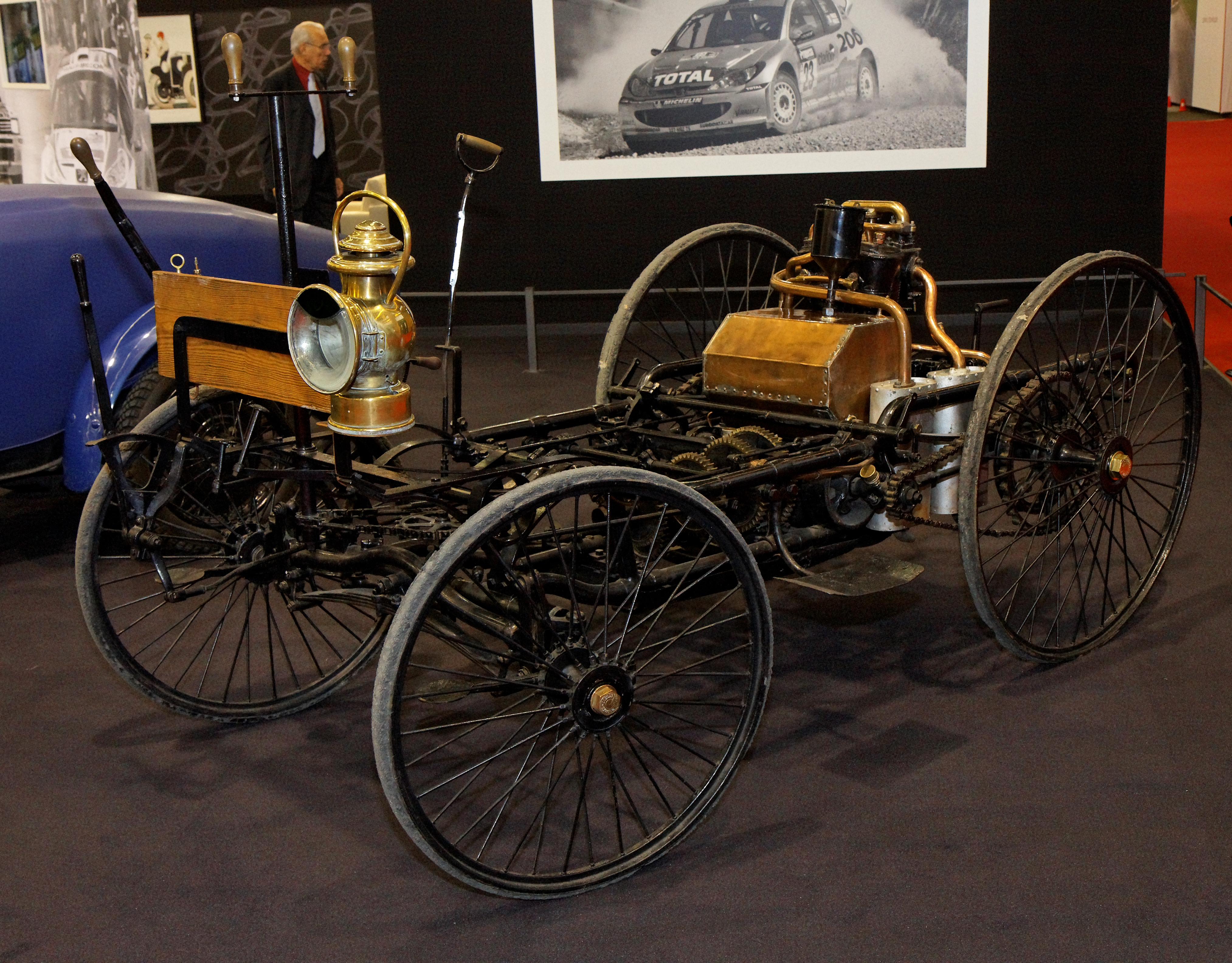 Photographie prise lors du salon rétromobile 2011 à Paris, porte de Versailles.